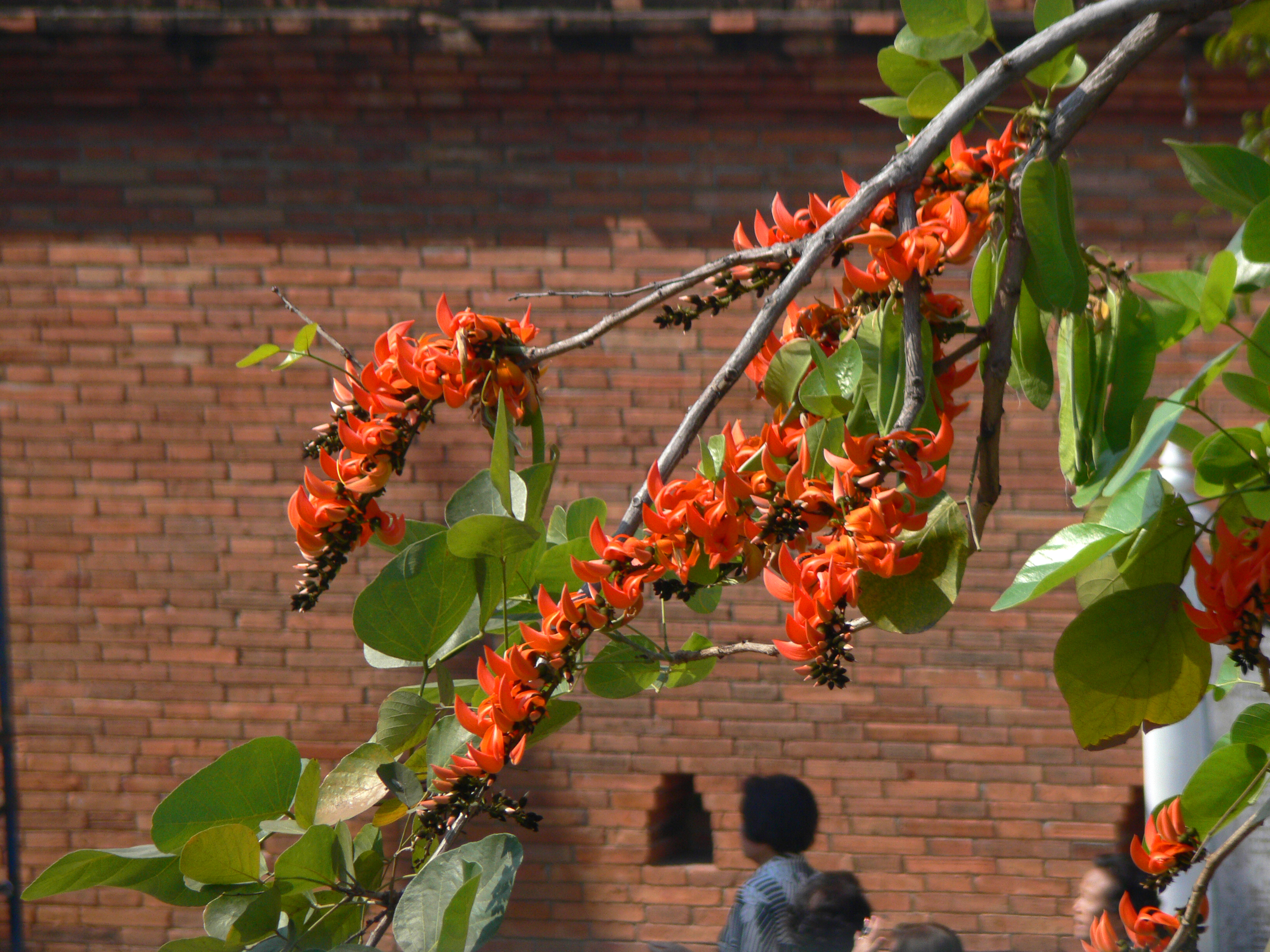 Naast een vlag en een zegel heeft Chiang Mai ook deze bloem als symbool, en wordt ook "vlam van het oerwoud" genoemd. Deze foto werd bij de oostelijke stadspoort van de stad Chiang Mai gemaakt.